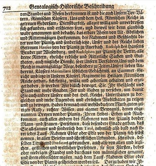 Kaiser Karl des Fünften Beleihung der früheren Adelsfamilie von der Planitz mit der Bezeichnung Edle im Jahr 1522 (Ausschnitt), abgedruckt in Valentin König: Genealogische Adels-Historie Oder Geschlechts-Beschreibung Derer im Chur-Sächsischen und angräntzenden Landen ... ältesten und ansehnlichsten Adelichen Geschlechter und ... Hoch-Gräflichen Häuser, Teil 1, Seite 712: Genealogisch-Historische Beschreibung, Nebst denen Stamm- und Ahnen-Teffeln des Alt-Adlichen Geschlechts derer Edlen von der Planitz. Verlag Deer. Leipzig 1727 Digitalisat in der Bayerischen Staatsbibliothek München [1], abgerufen am 7. August 2014